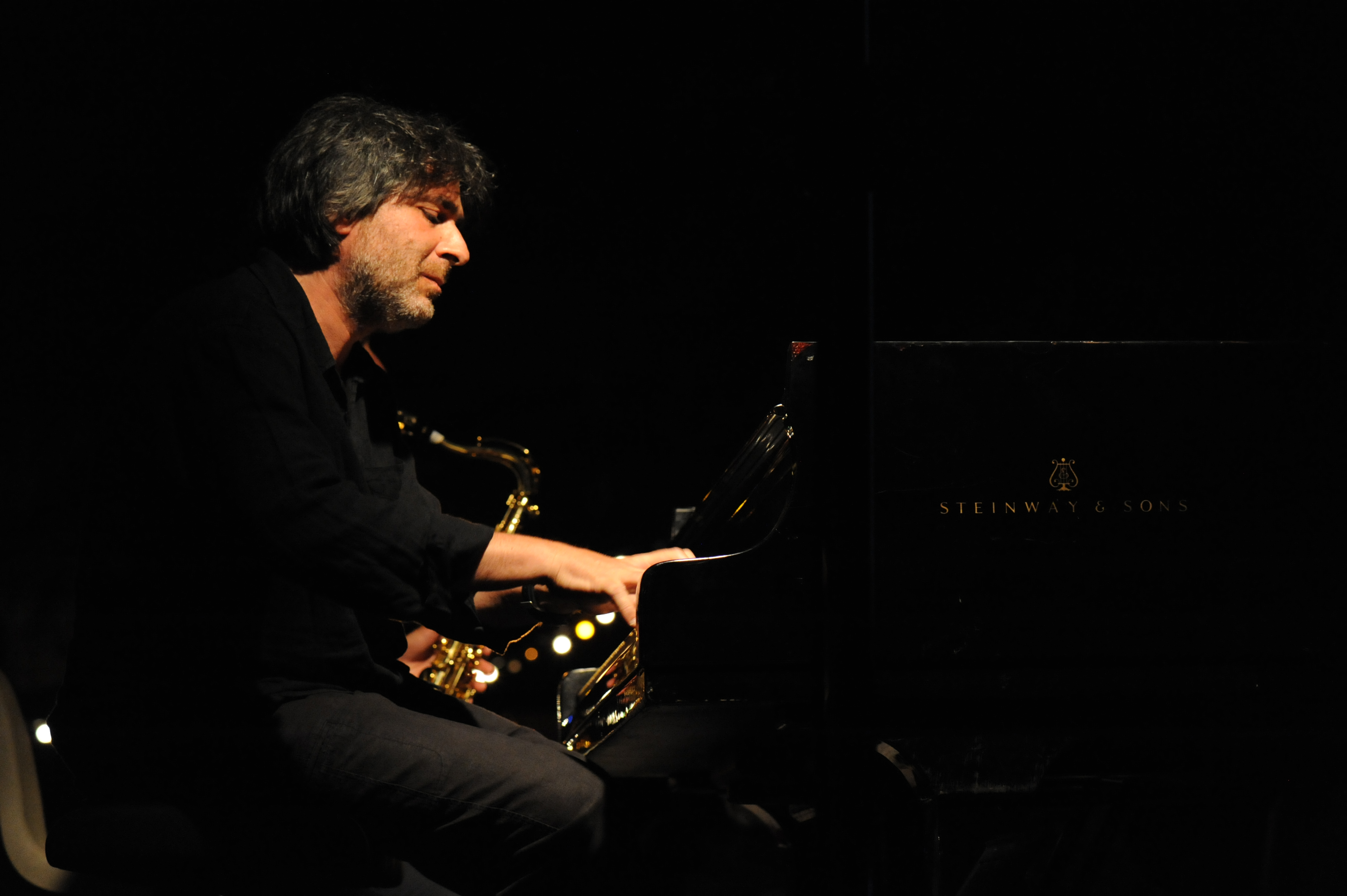 Alexandros Markeas au festival Musique en Chemin 2013